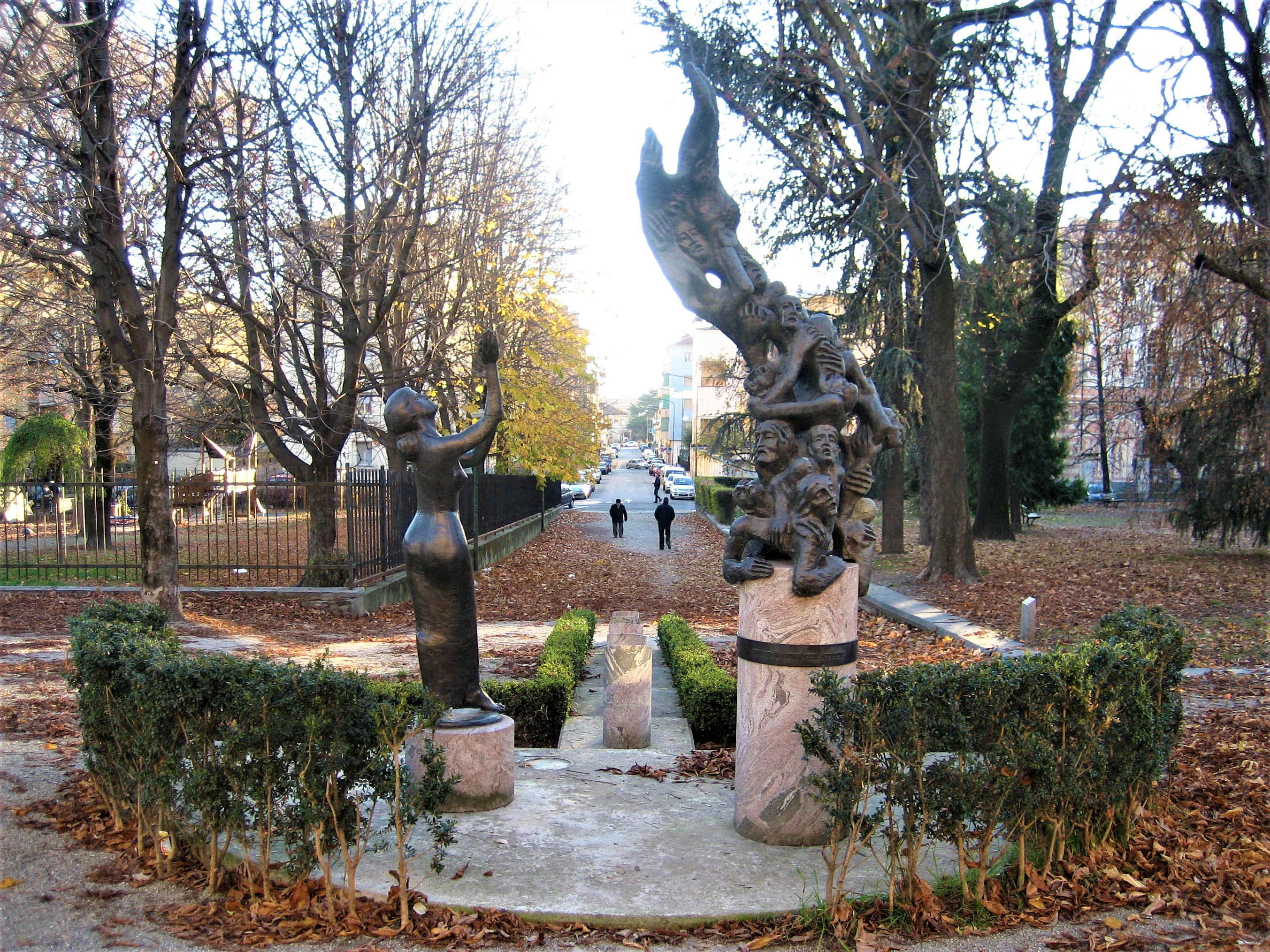 Denkmal Waldenserverfolgung Rundplastik 2005